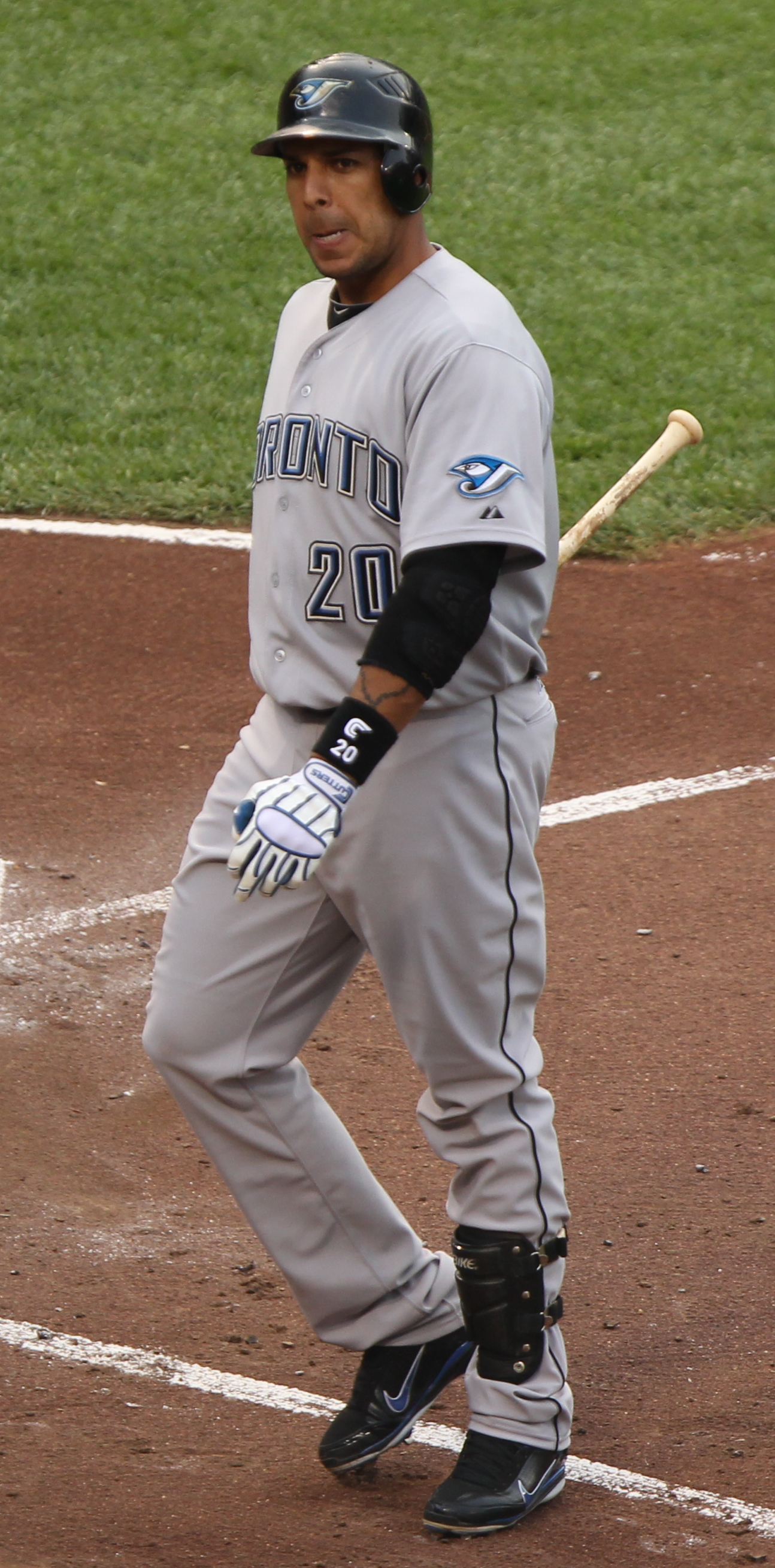 Juan Rivera